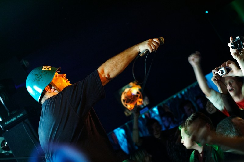 Krzysztof Skiba (Big Cyc).